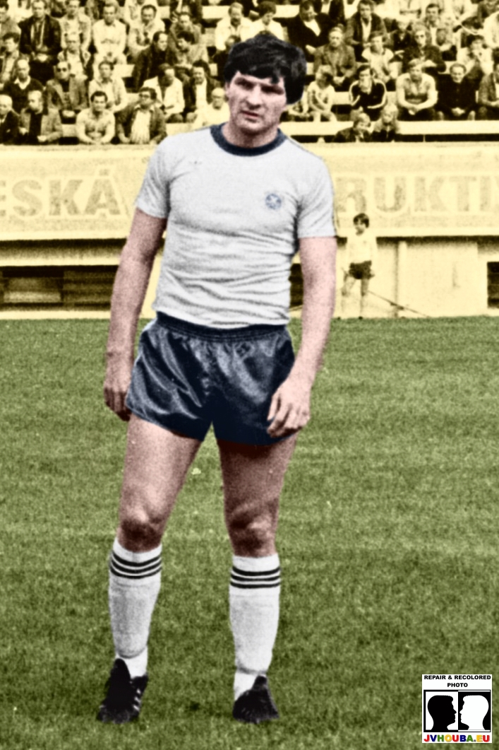 František Weigend (* 5. prosince 1951) Sklo Union Teplice cca 1979